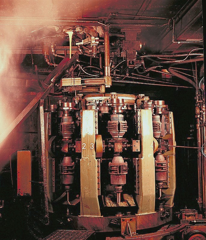 Original image description from the Deutsche Fotothek Facharbeiter für Glastechnik